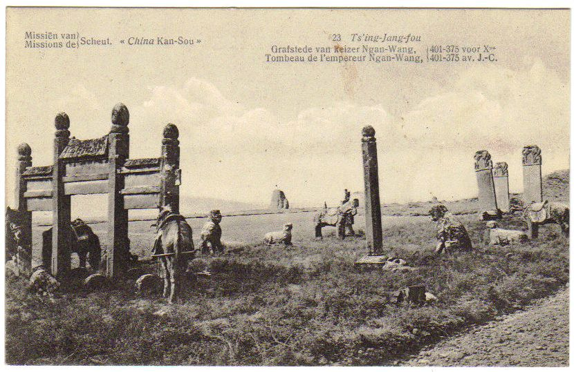 圣心会传教士拍摄的甘肃庆阳府周赧王陵。 教士在明信片上标出的在位年份为周安王在位年份（公元前401－375年）。但查阅中文资料，这里的Ngan-Wang应为应为赧王而非安王，民间并无周安王葬于庆阳之说。庆阳市今已增修周祖陵，暂未找到相应位置的现代照片。